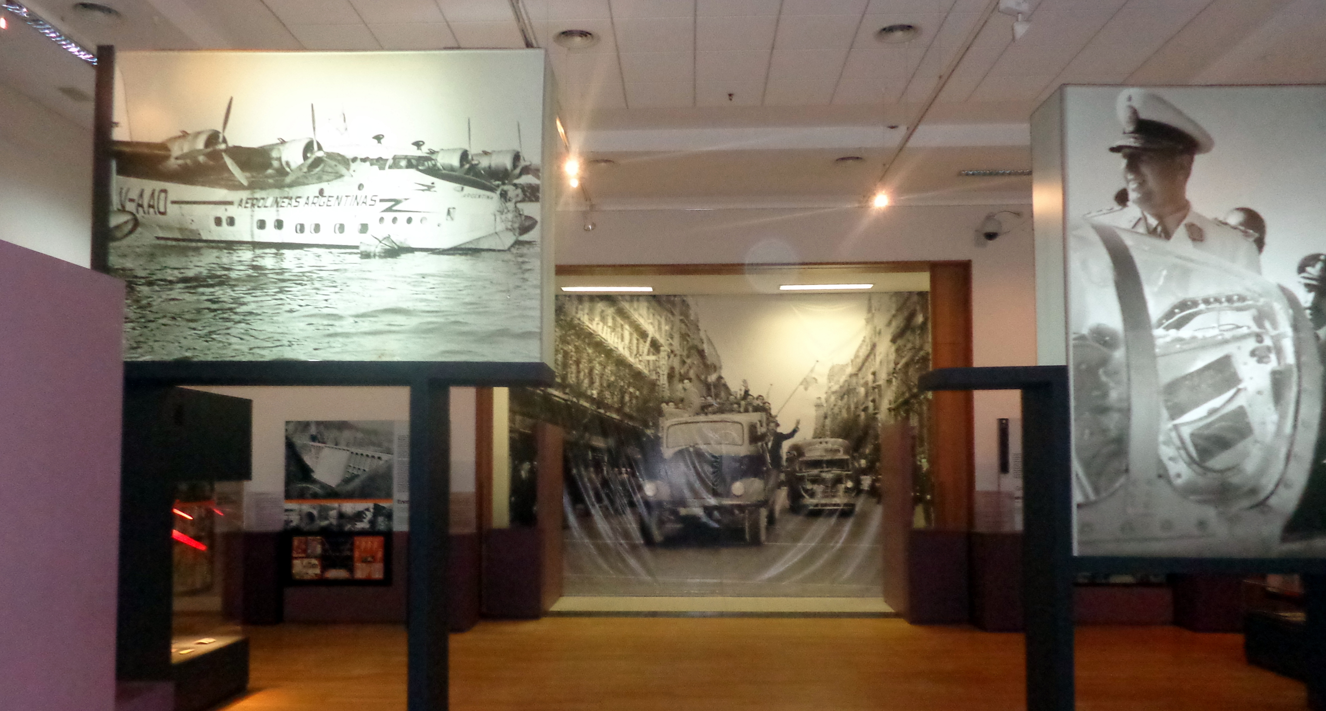 Museo Histórico Provincial 17 de Octubre, Quinta San Vicente, Provincia de Buenos Aires, Argentina.